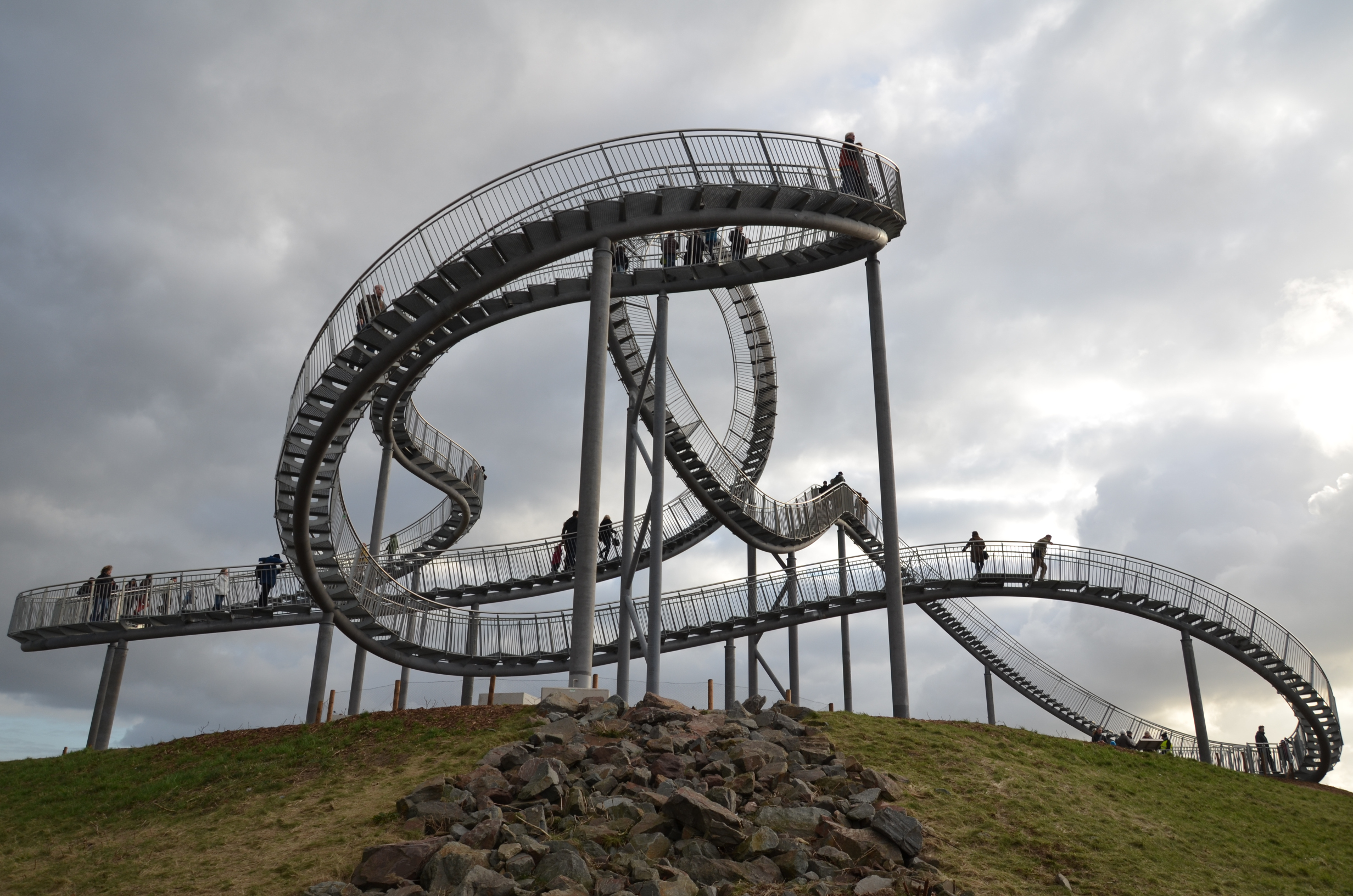 Tiger&Turtle Anfang 2012 auf der Heinrich-Hildebrand-Höhe im Angerpark in Duisburg. Ansicht von Norden